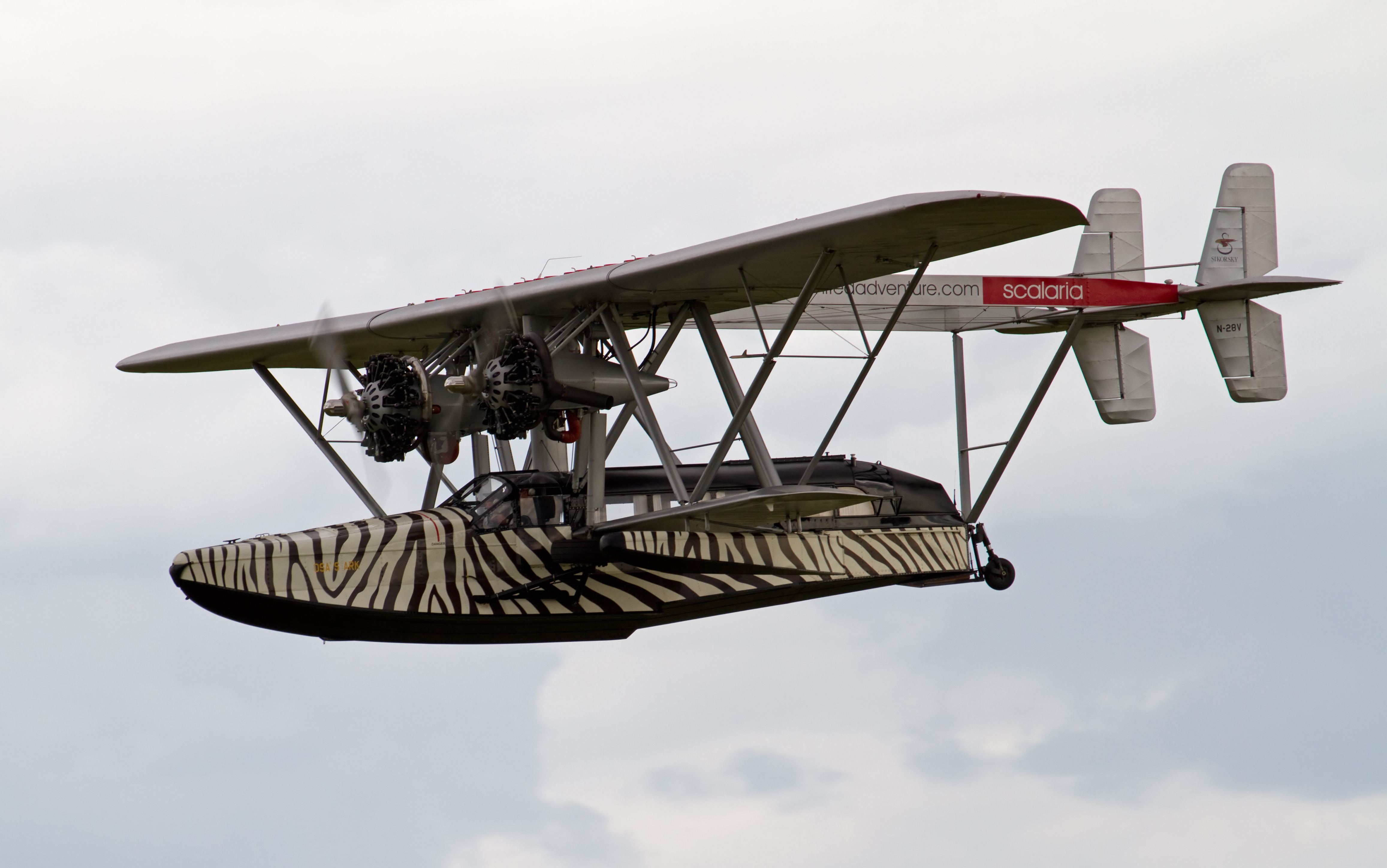 Sikorsky S-38B 1